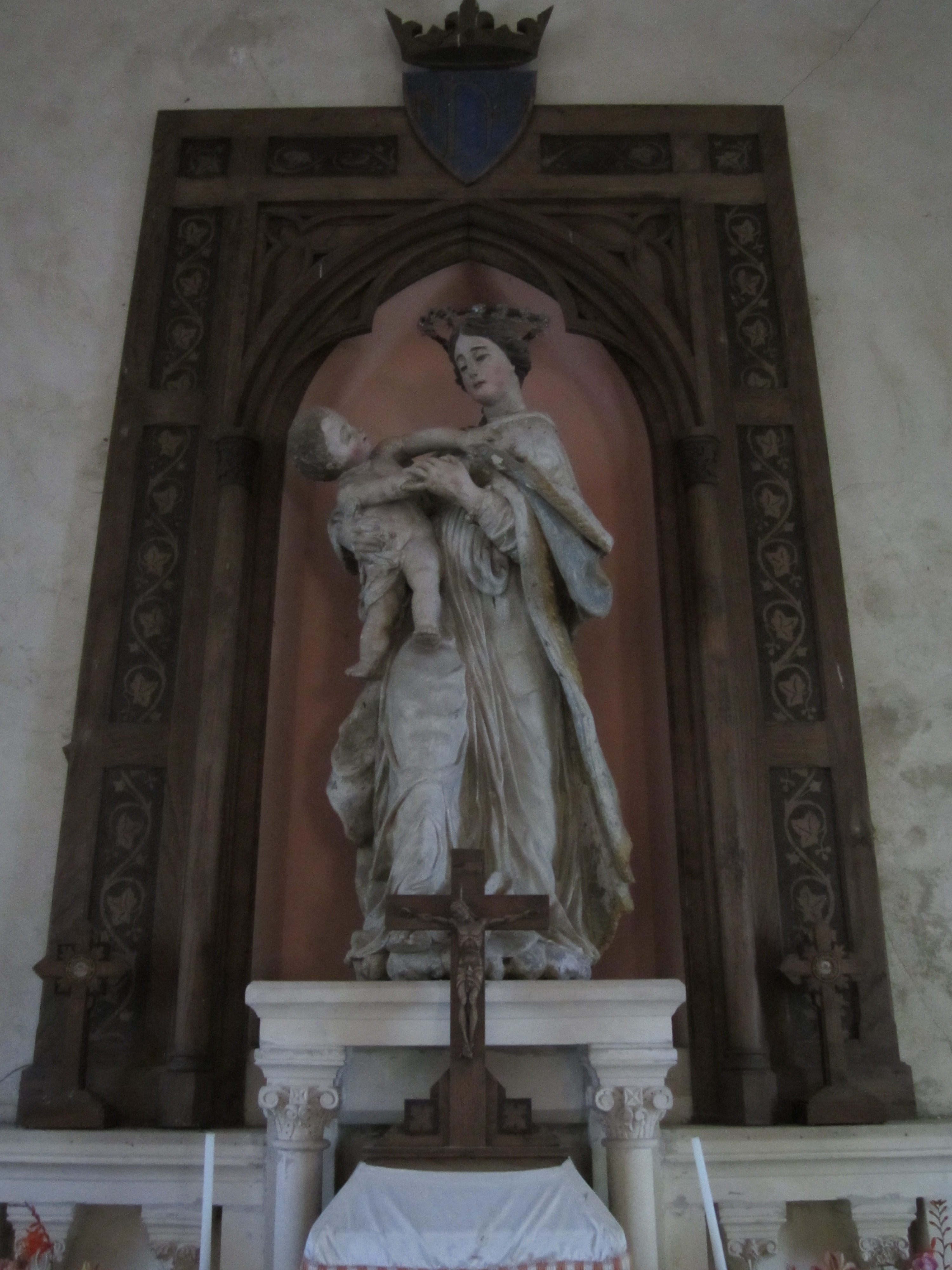 Chapelle Notre-Dame de la Délivrande de Rauville-la-Place